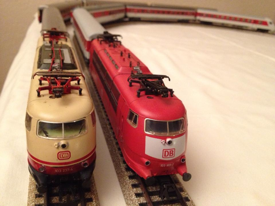 Meine Modellbahn